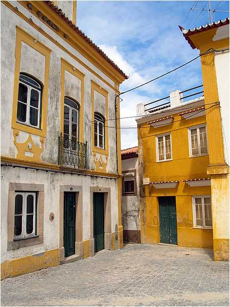 Nisa: les maisons jaunes